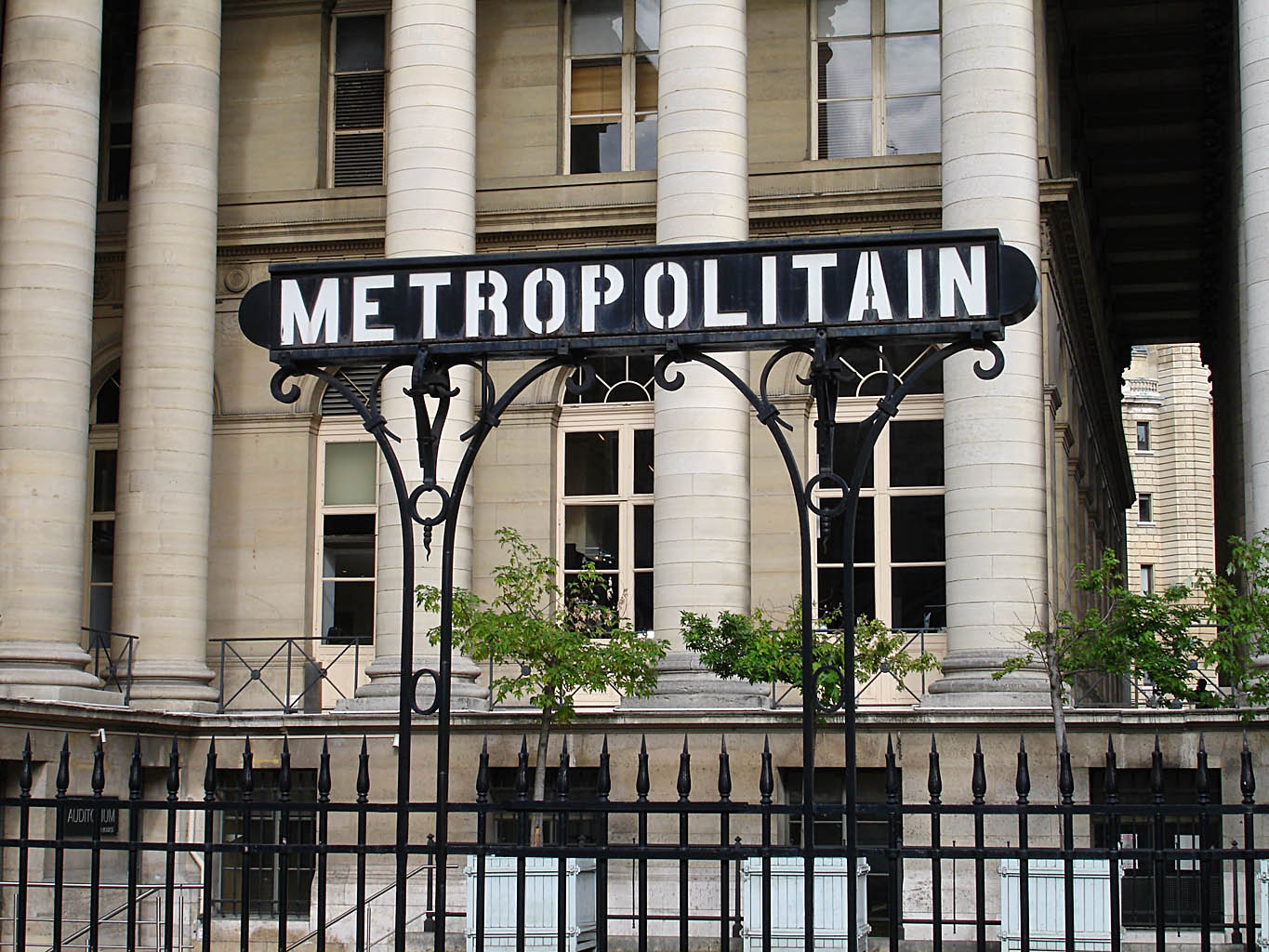 L'entrée de la station Bourse de la ligne 3 du métro de Paris, France